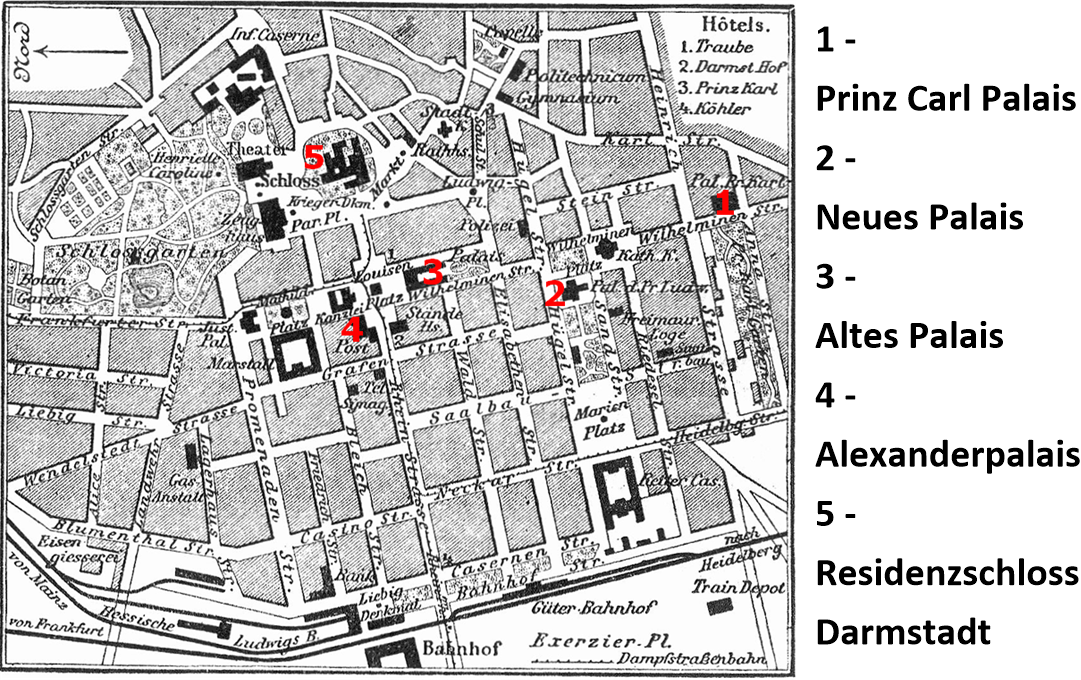 Karte der Darmstädter Innenstadt, eingetragen sind die Positionen der verschiedenen Schlösser und Palais. Die Karte basiert auf Karte Darmstadt MKL1888 aus Meyers Konversationslexikon, 4. Auflage